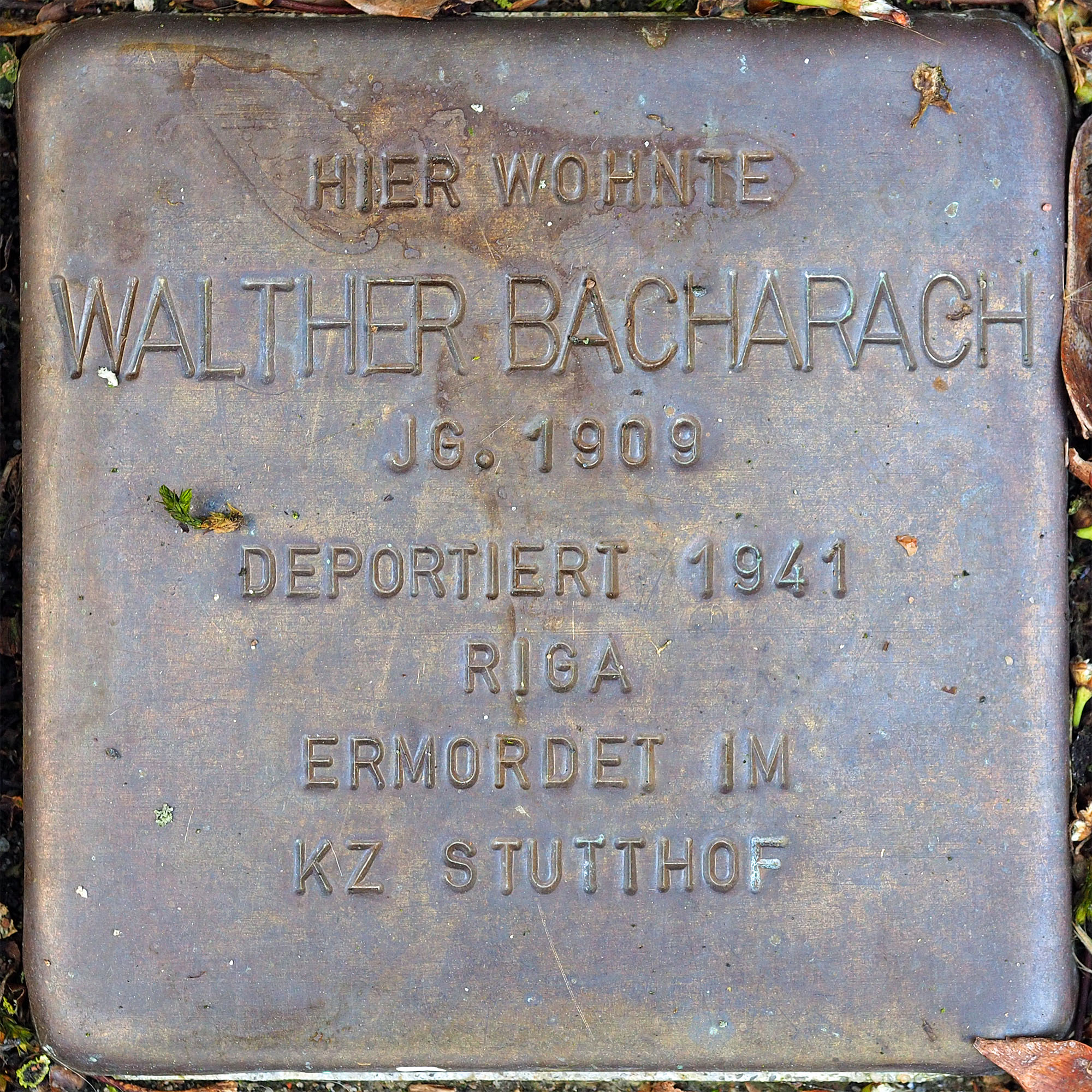 Stolpersteine MG: Bacharach, Walther